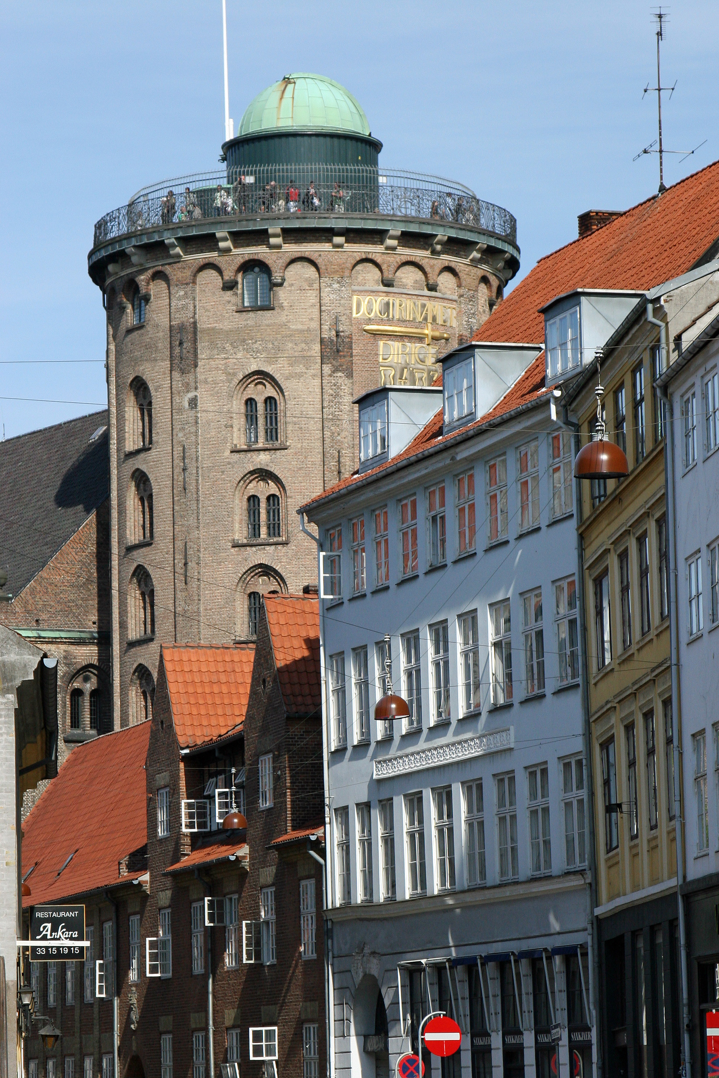 The Eound Tower in Copenhagen, Denmark seen from Køgmagergade